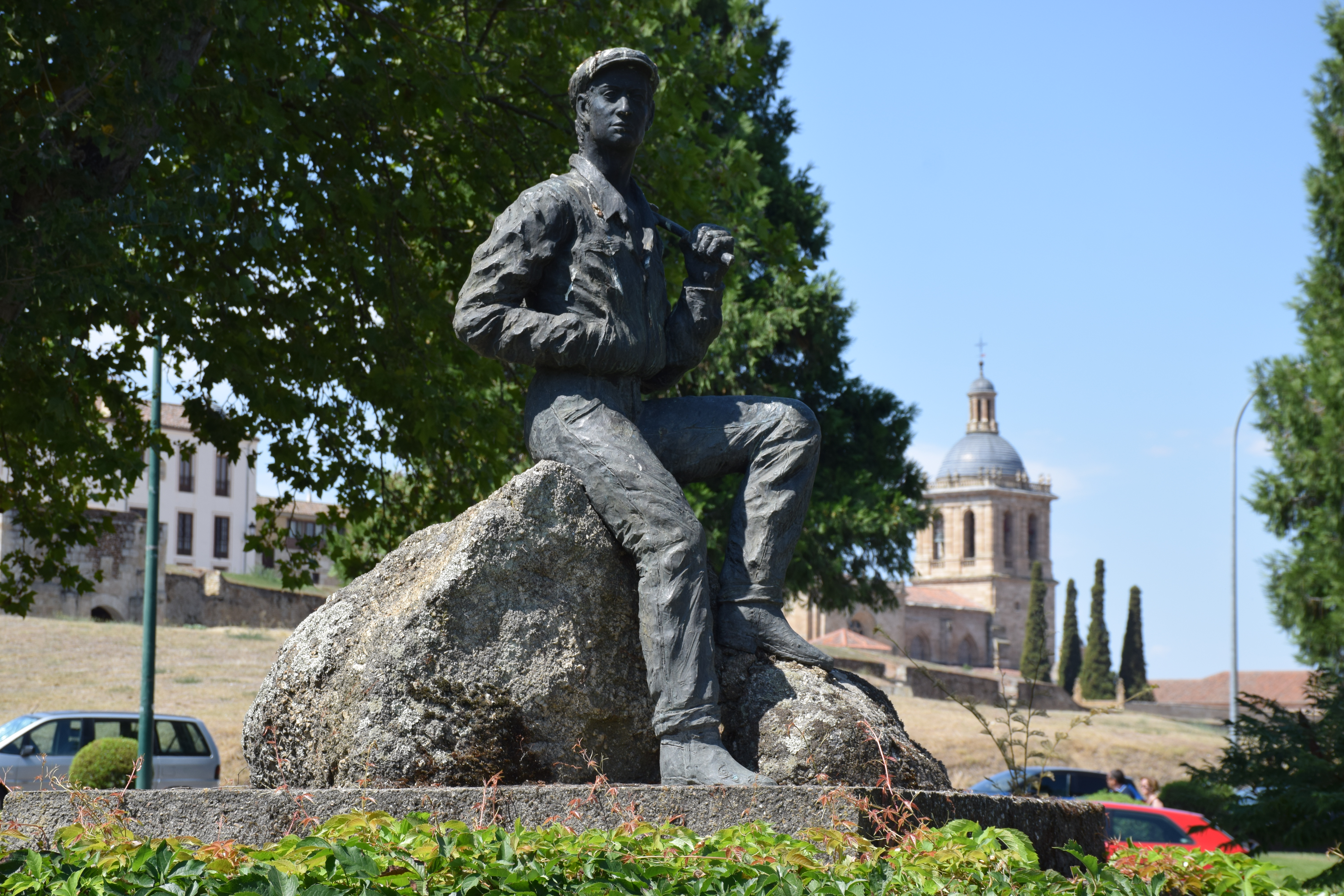 Monumento al maletilla en el parque de La Glorieta